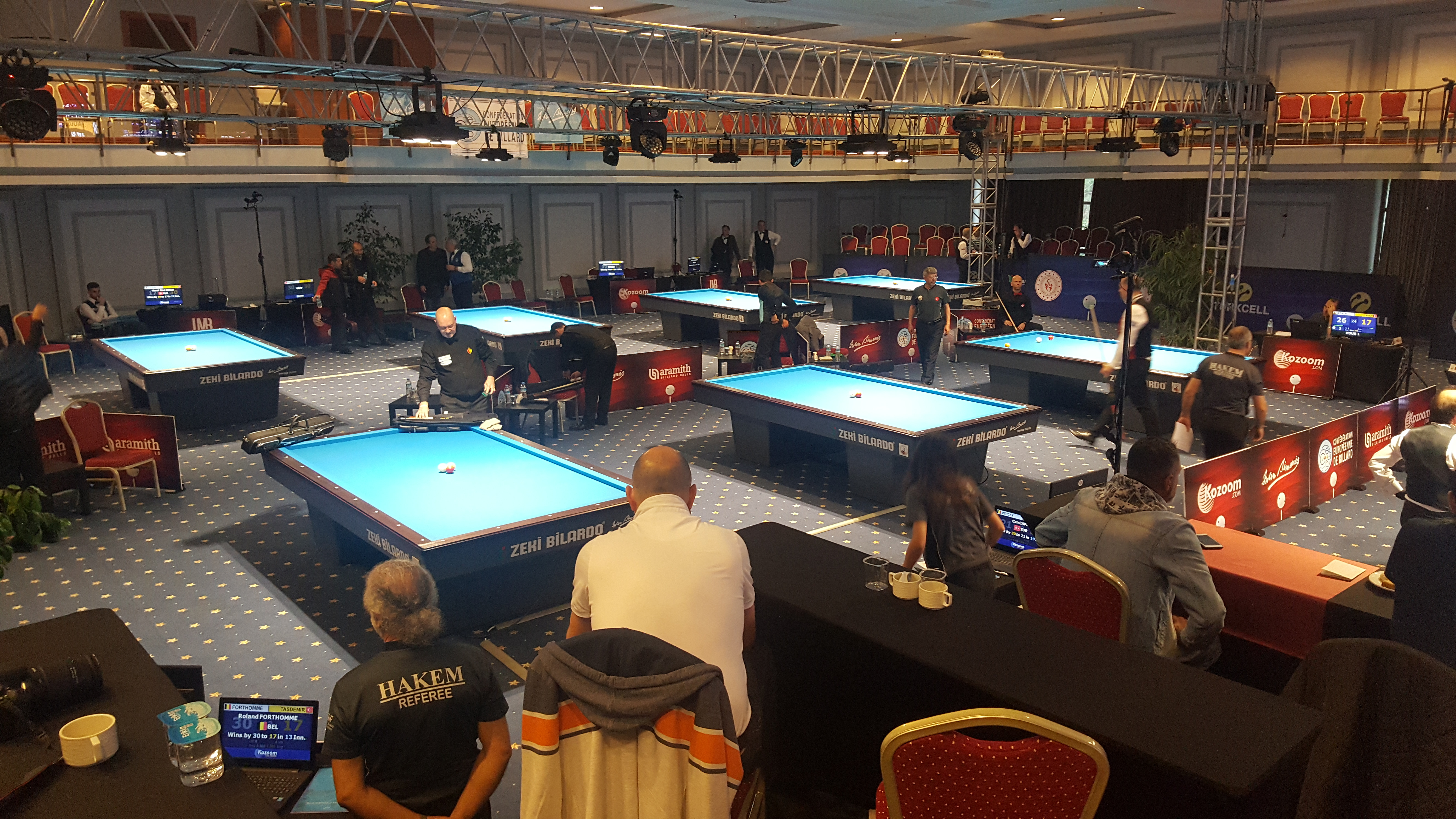 Dreiband-Weltcup 2020/1, Spielsaal im „Limak Atlantis Resort & Hotel“ in Antalya